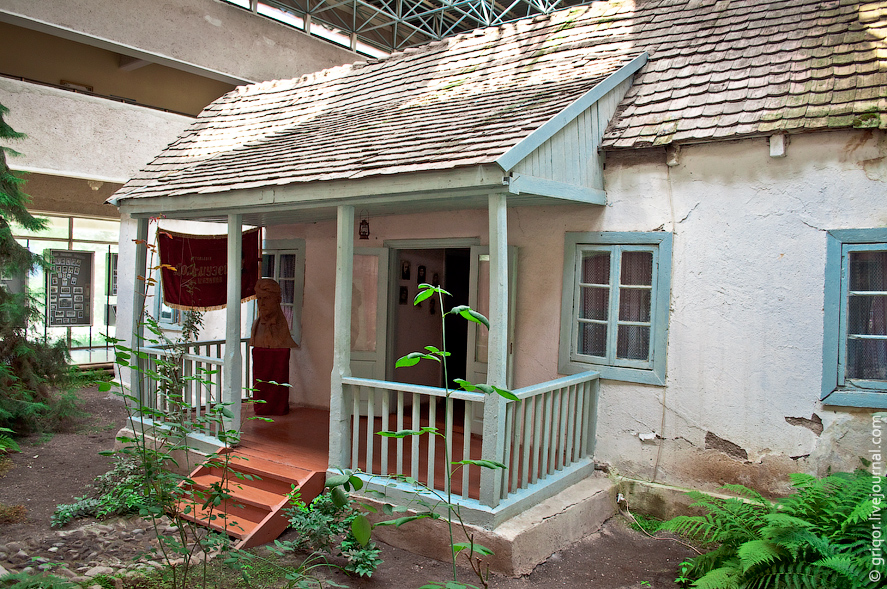 Дом-музей Степана Шаумяна_1